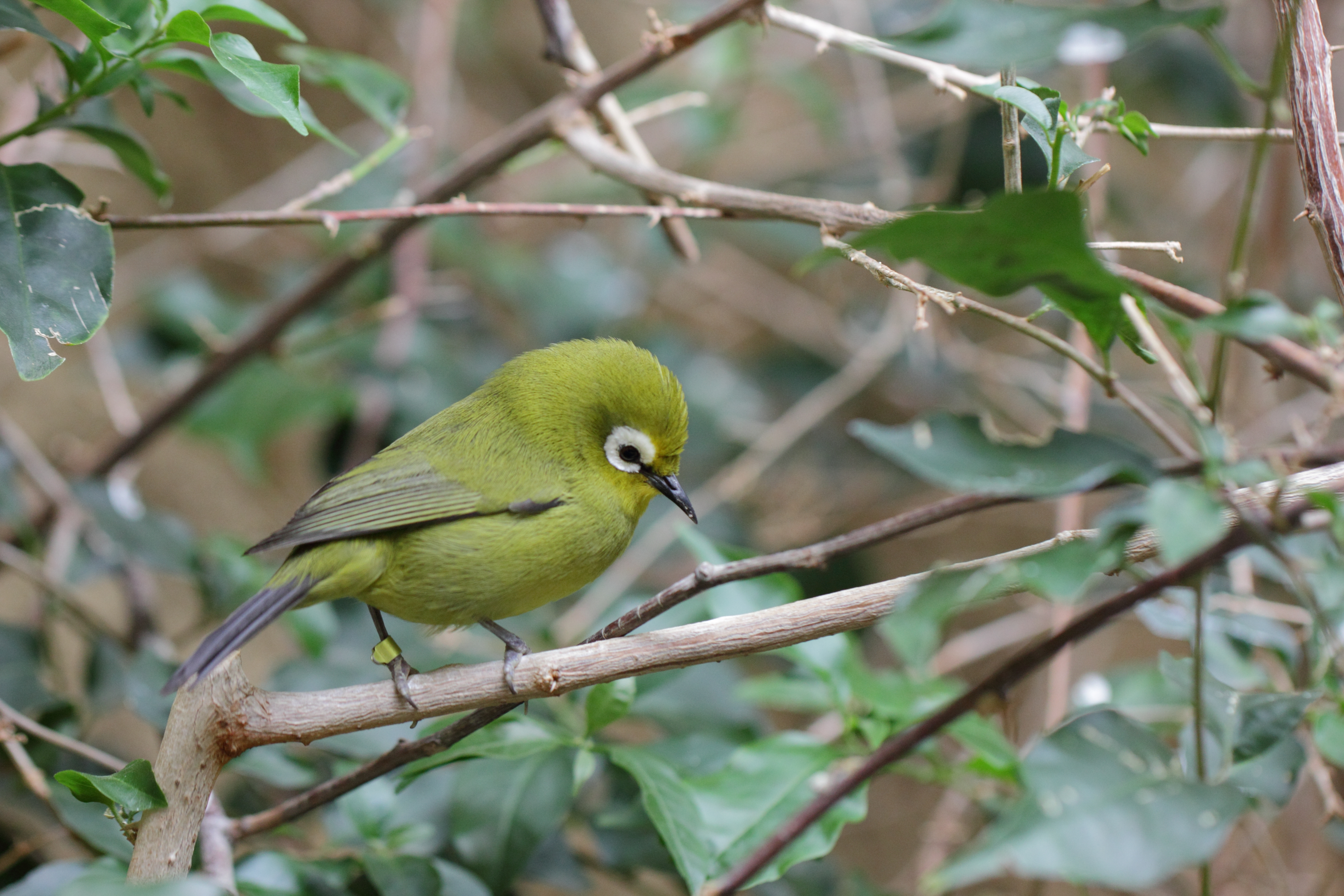 Kikuyu-Brillenvogel im Tiergarten Schönbrunn.